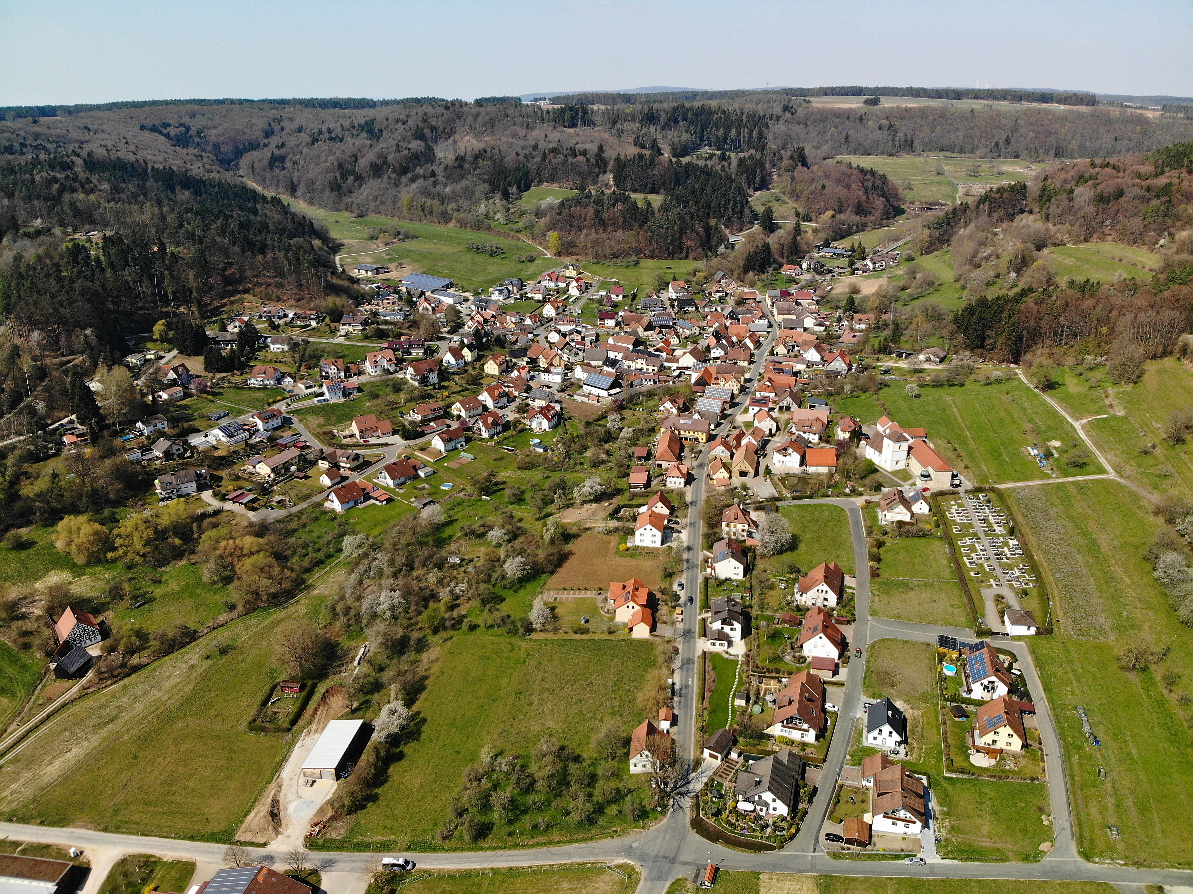 Niedermirsberg (Ebermannstadt) Luftaufnahme (2020)